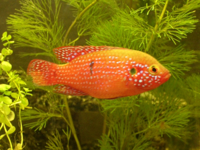 hemichromis lifalili (female adult)/ Hemichromis lifalili (Juwelenbuntbarsch, Lifalilis Buntbarsch, Lifalili-Buntbarsch) (erwachsenes, weibliches Exemplar)